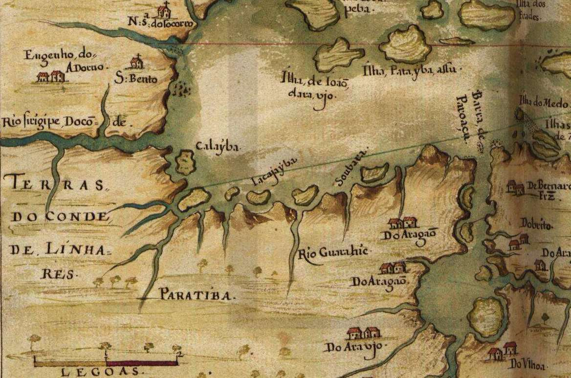 Bahia de Todos os Santos, Atlas de João Teixeira Albernaz, 1640